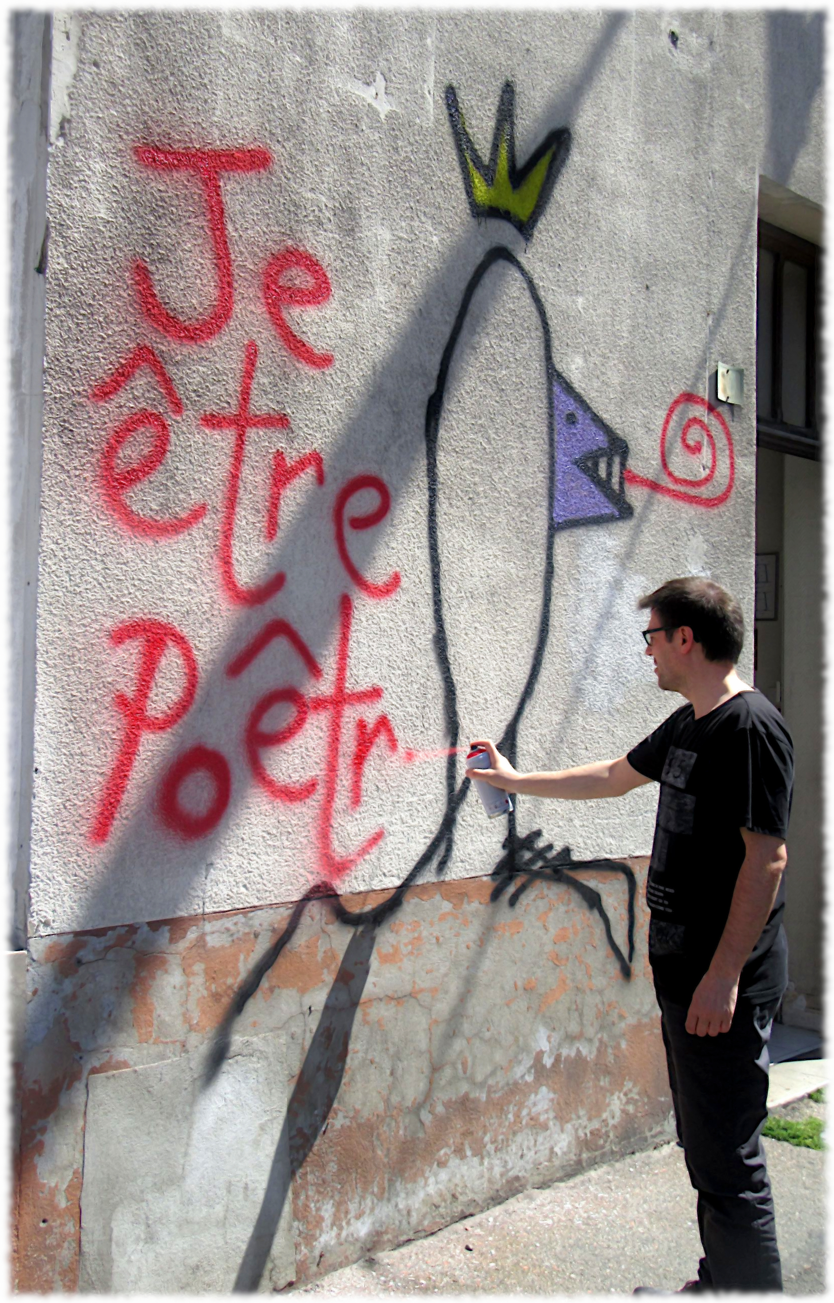 Le poète Pierre Soletti bombe les murs de Grenoble avec la phrase "Je être Poêtre"